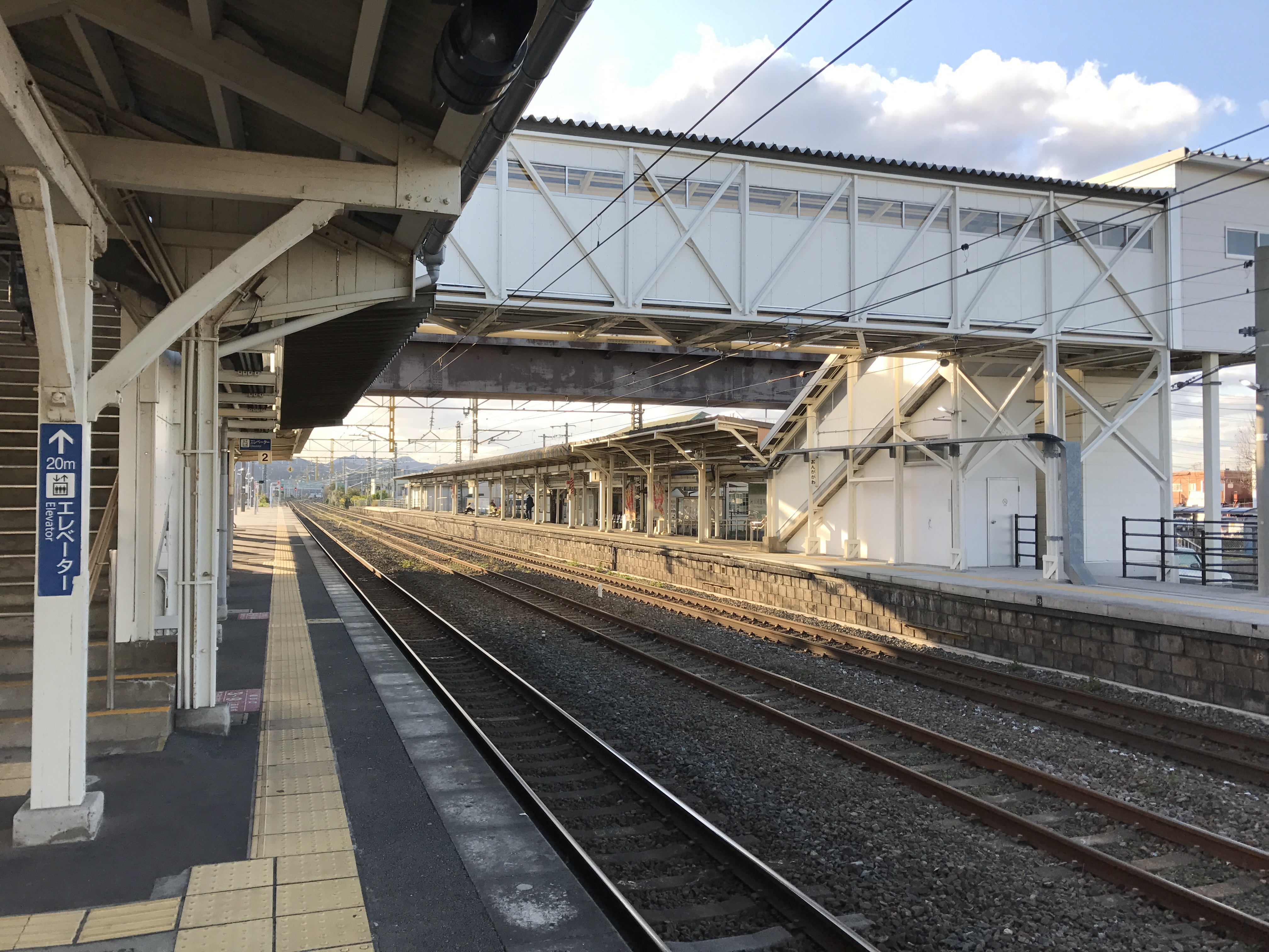 遠賀川駅のホーム(奥は海老津方面)